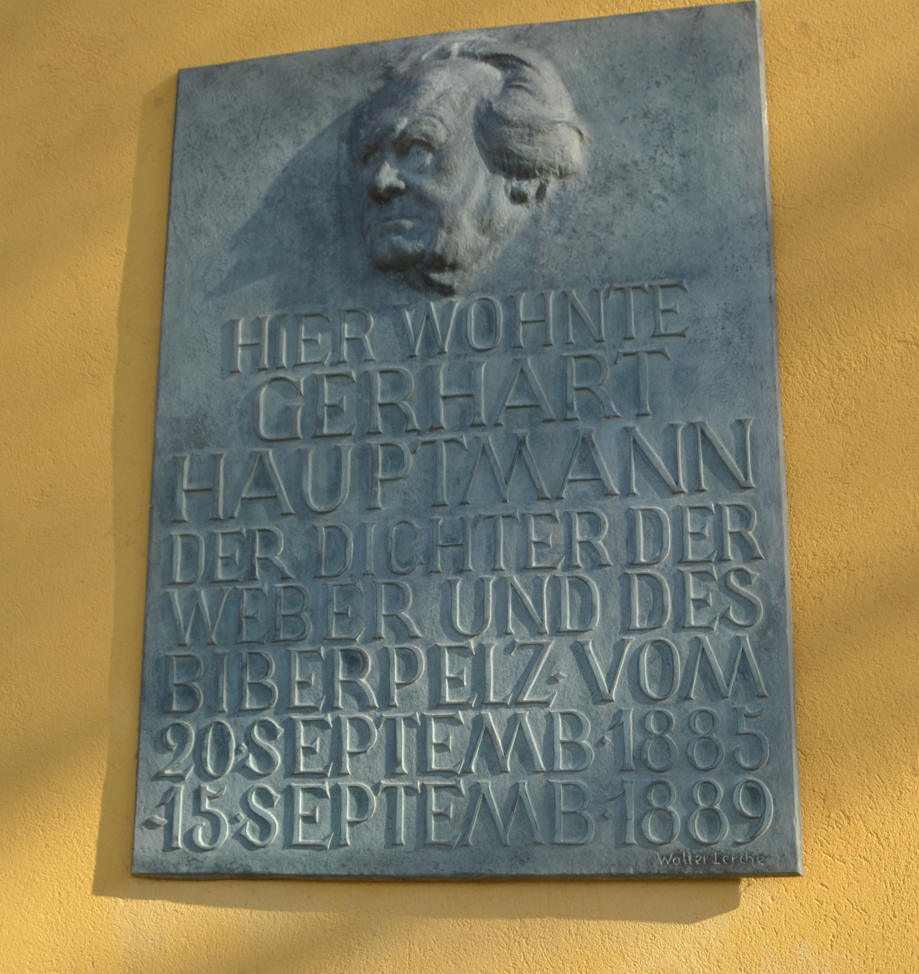 Gedenktafel an der Fassade des Gerhart-Hauptmann-Museums Erkner zur Friedrichstraße